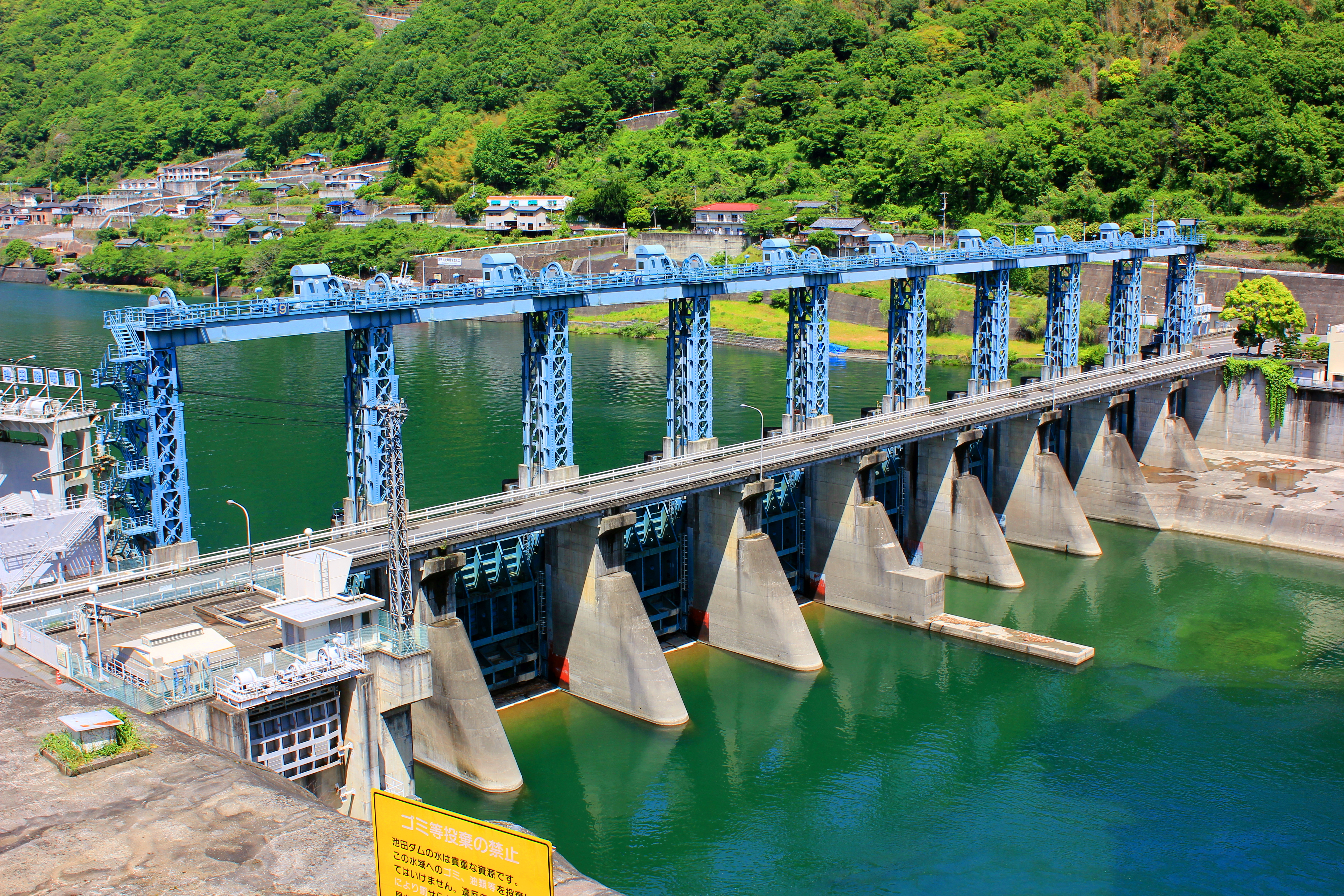 池田ダム（徳島県・吉野川。水資源機構管理）